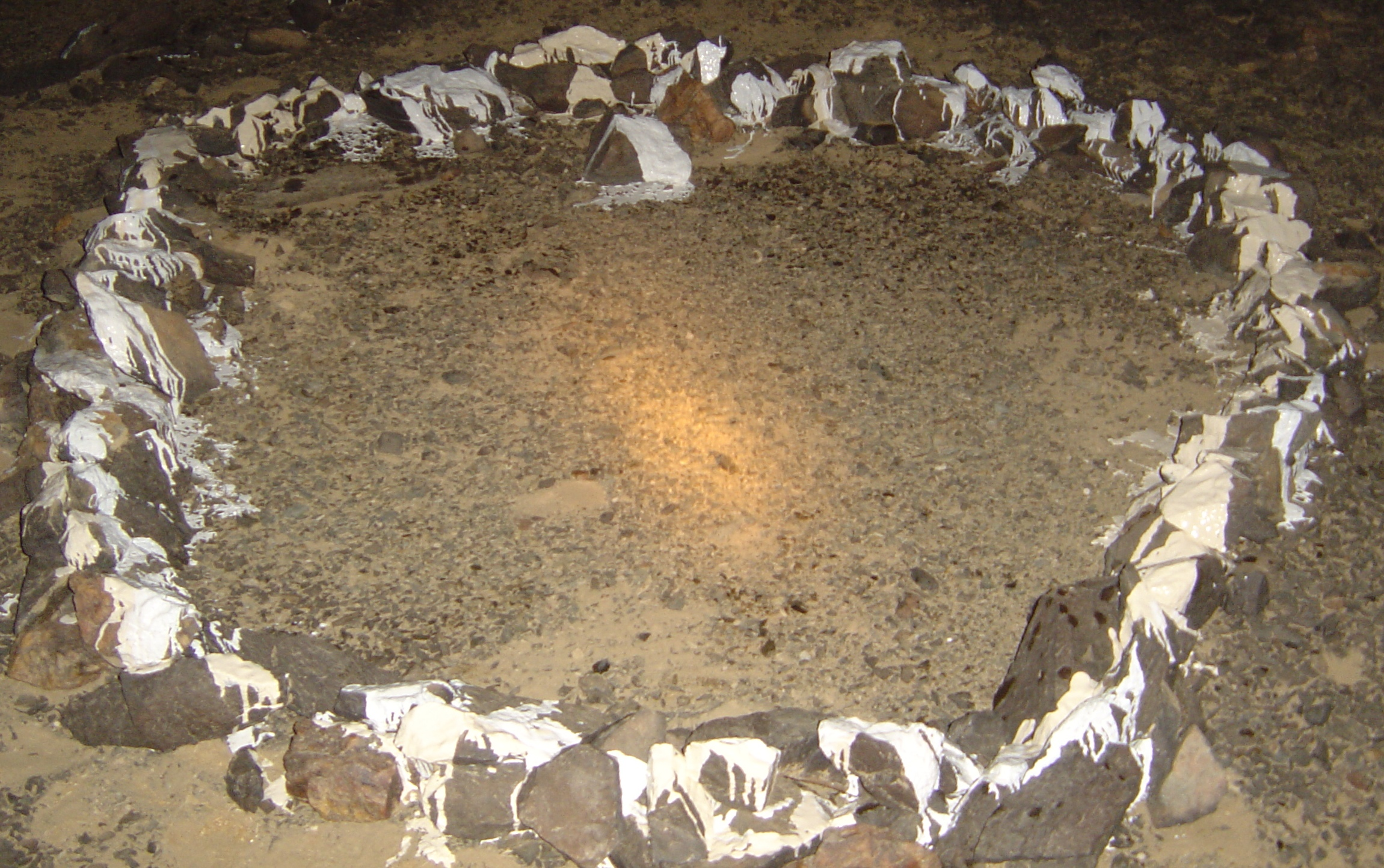 أحدث صور أخذت لضريح السيدة آمنة بنت وهب رضي الله عنه